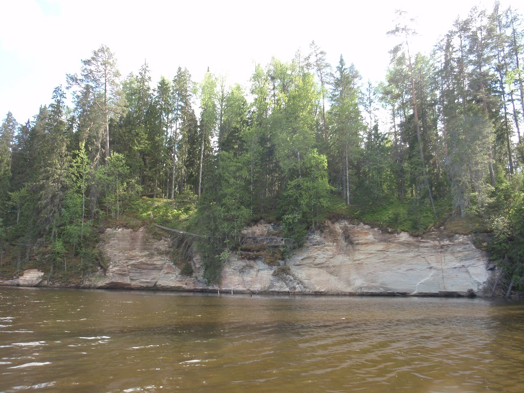 Mõsumägi 2015 mais